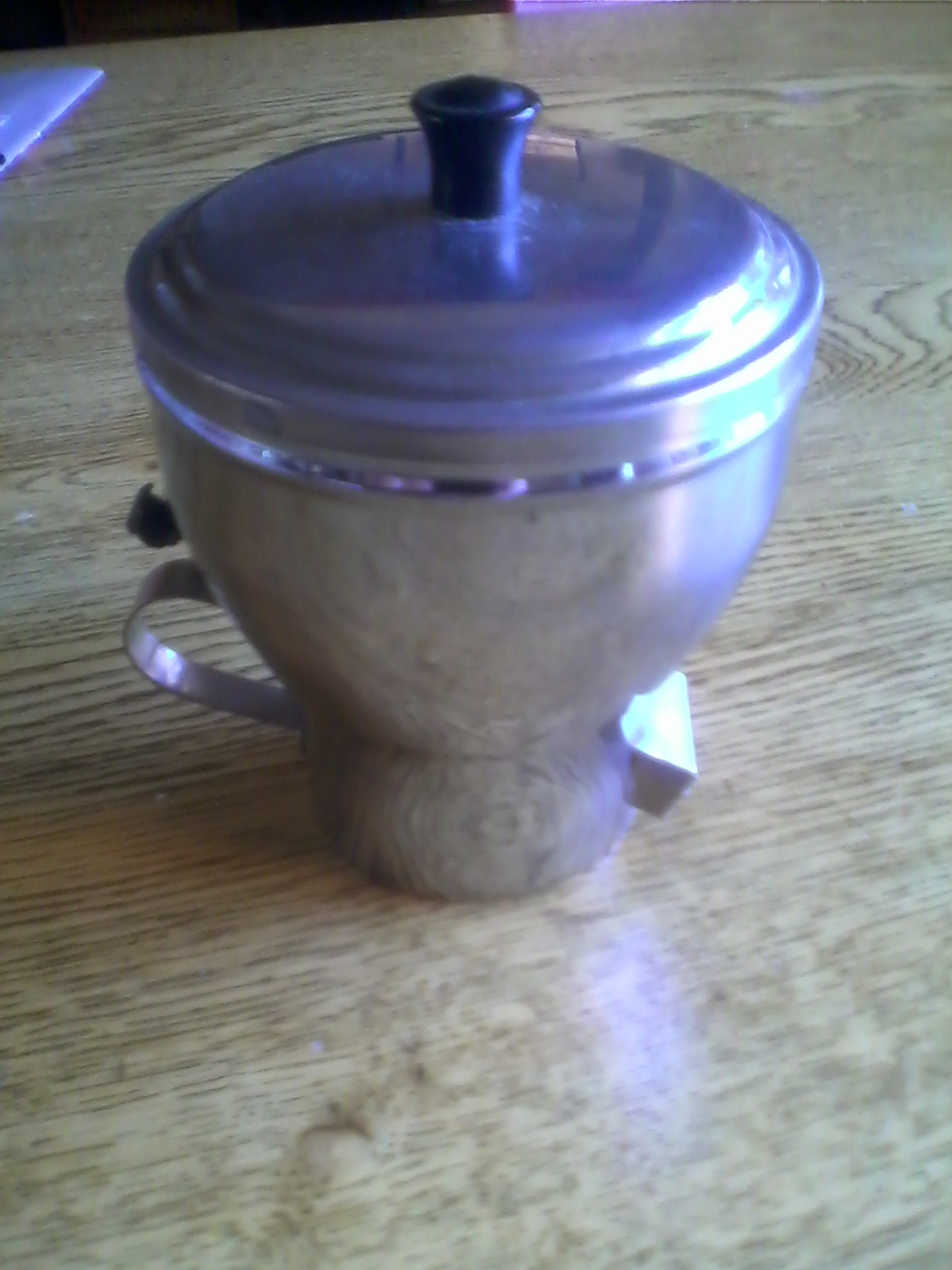 Suikerdispenser